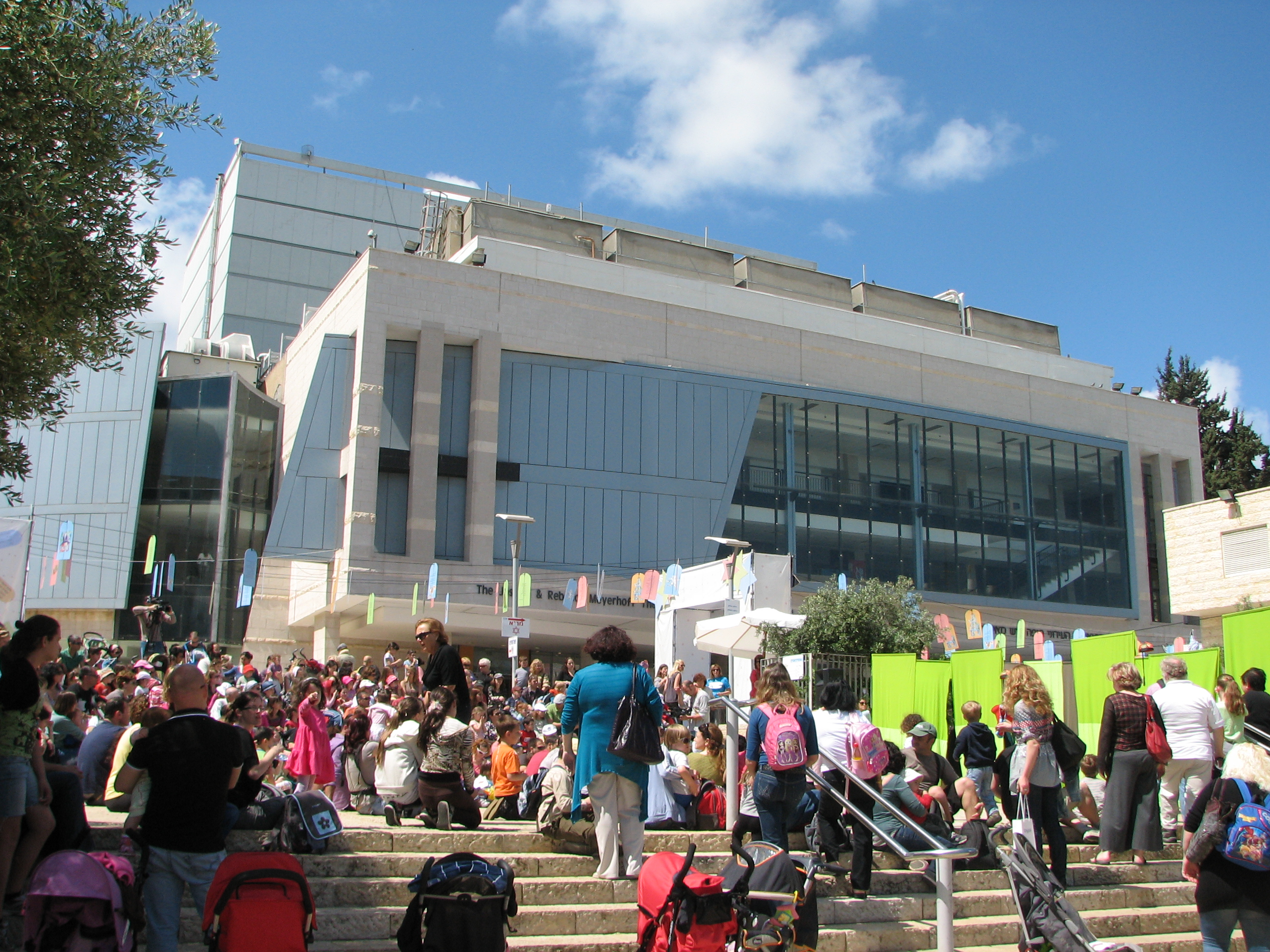 The 21 Haifa International Children's Theater Festival. The festival has become a tradition that occures annually, during the Passover Holiday. פסטיבל חיפה הבינלאומי להצגות ילדים הוא פסטיבל לתיאטרון ילדים, המתקיים בחיפה מדי שנה בימי חול המועד פסח. בשנת 2011 נערך הפסטיבל בפעם ה-21. הפסטיבל נערך במשכן תיאטרון חיפה שבשכונת הדר הכרמל, בגן בנימין הסמוך לו ובאתרים נוספים בשכונה, ובכללם מוזיאון המדעטק. התפיסה האמנותית של הפסטיבל היא הפיכת ההצגות המועלות באולמות והאירועים שמחוץ להם להפנינג לילדים. הפסטיבל אורך כשלושה ימים, שבמהלכם מועלים עשרות הצגות ומופעים. פסטיבל-21 הוקדש לספריה של לאה גולדברג מופע חוצות מחוץ למבנה התיאטרון